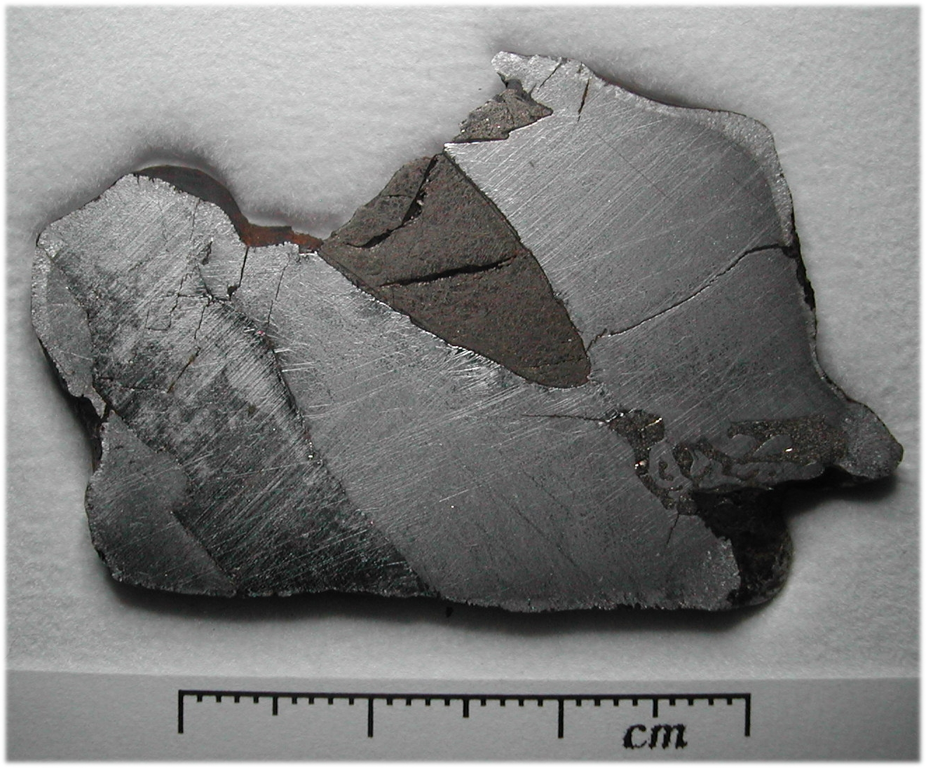 Meteorit Sikhote Alin. Scheibe mit Troilit-Einschlüssen, einem rekristallisiertem Rand durch hohe Temperaturen beim Flug durch die Atmosphäre und Neumann-Linien